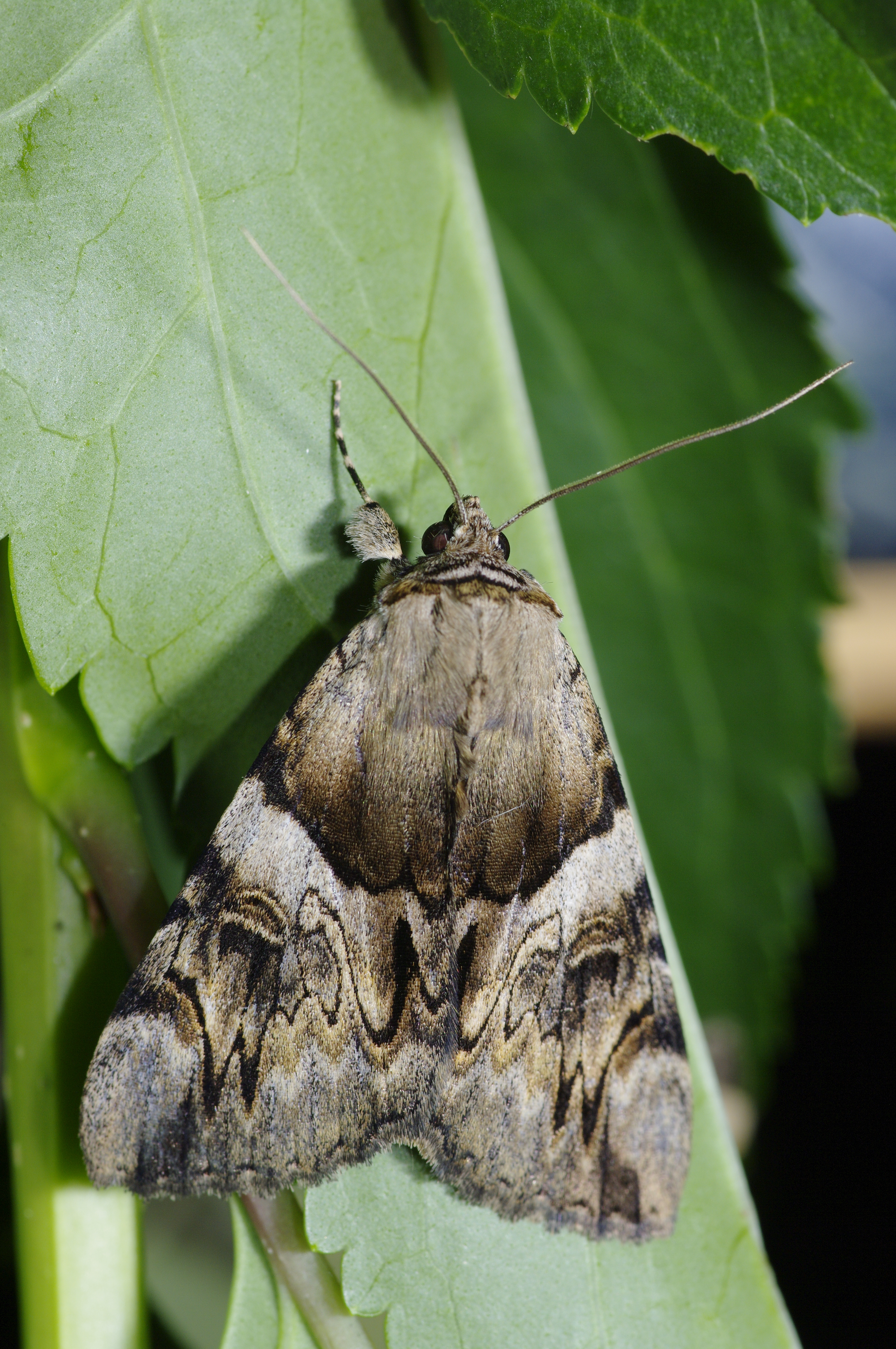 Lichénée jaune (Catocala fulminea) photographiée de nuit dans le parc régionale de la Brenne.